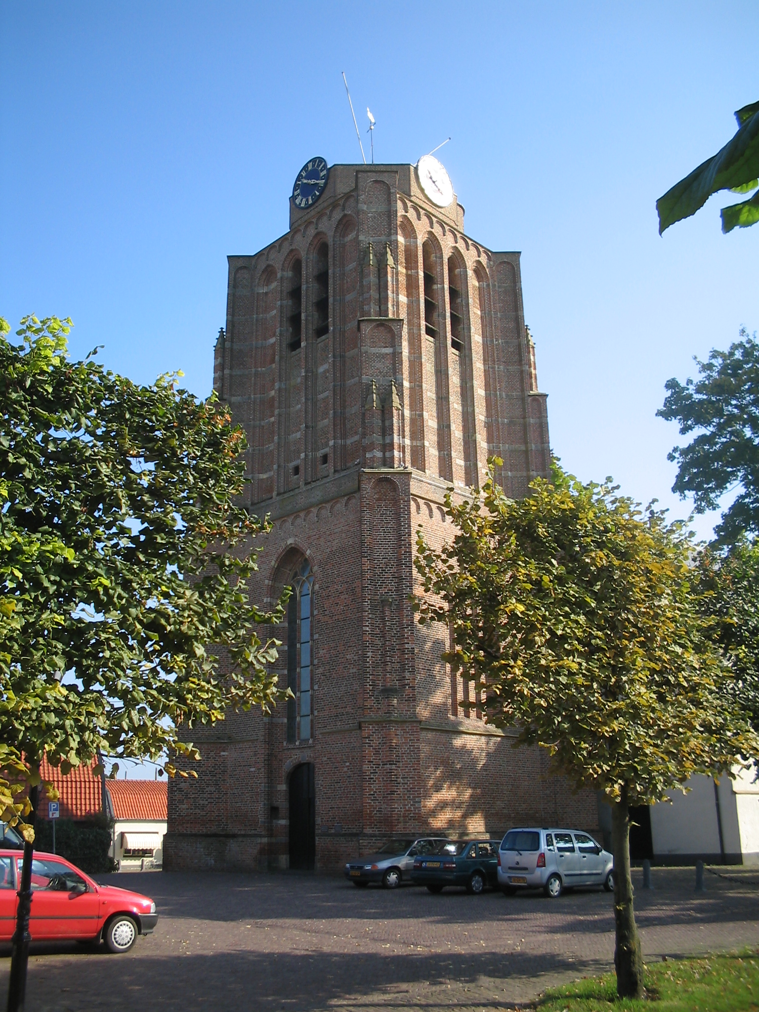 Toren Sint-Pieterskerk, Netherlands. Voorstraat 94 4153 AN te Beesd, gemeente Geldermalsen (GE).